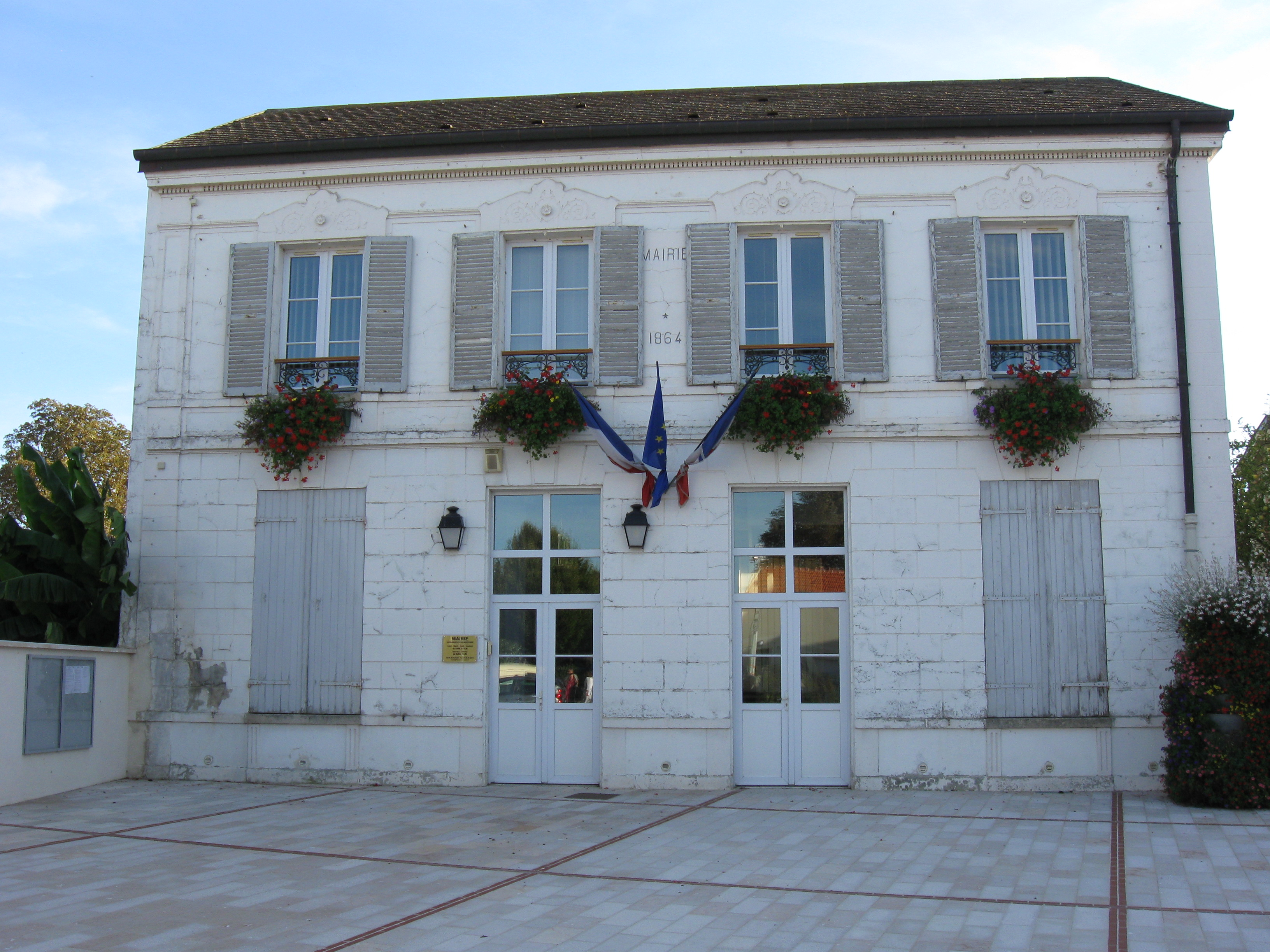 Mairie de Fresnes-sur-Marne. (Seine-et-Marne, région Île-de-France).